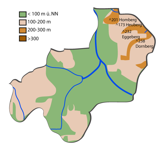 Topographische Karte von Herford (Nordrhein-Westfalen).